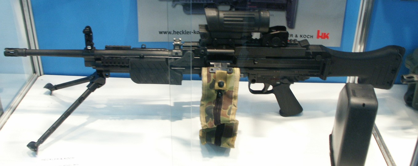 German light machine gun (SAW) MG43 (MG4)